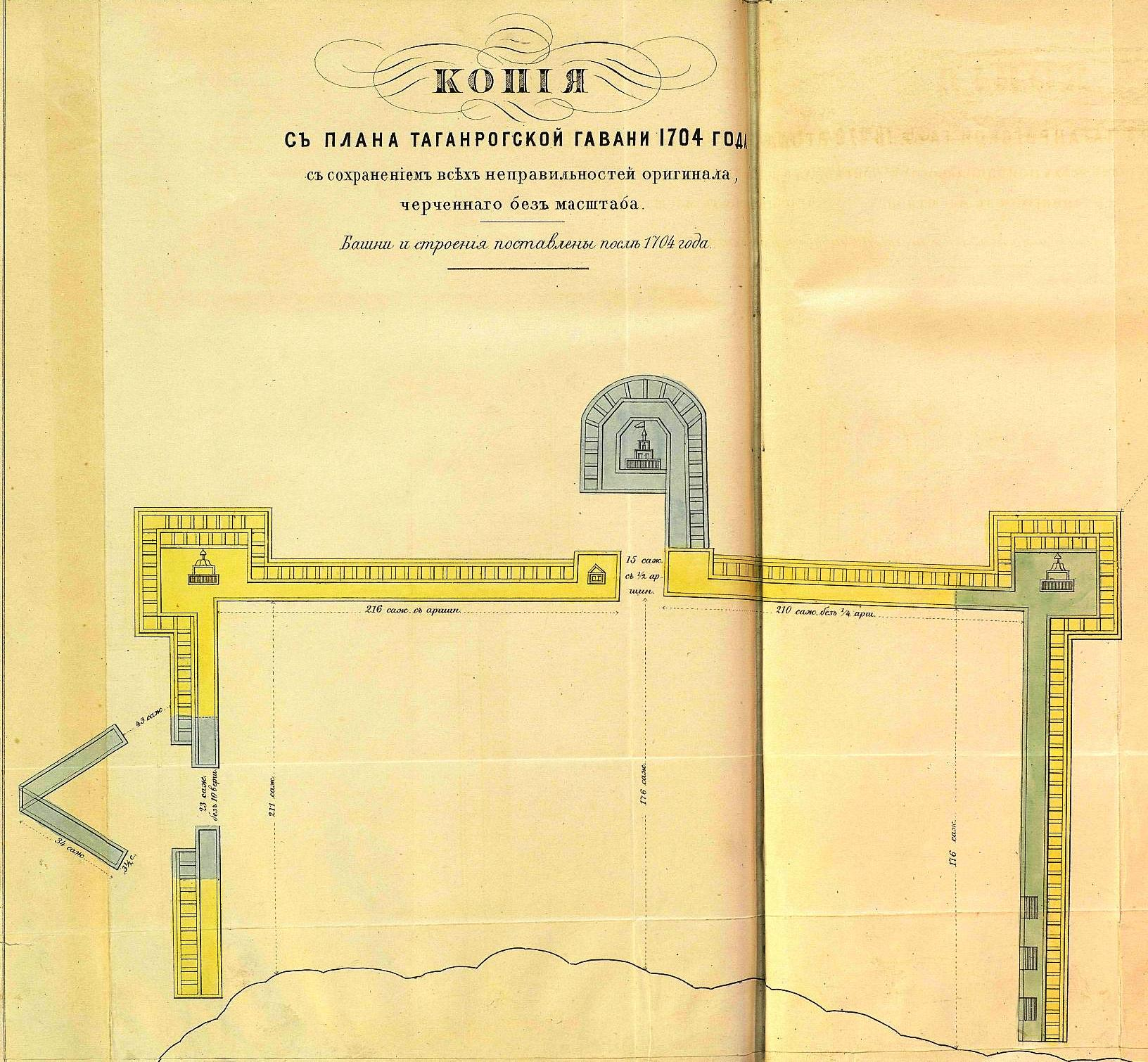 Таганрогская_гавань